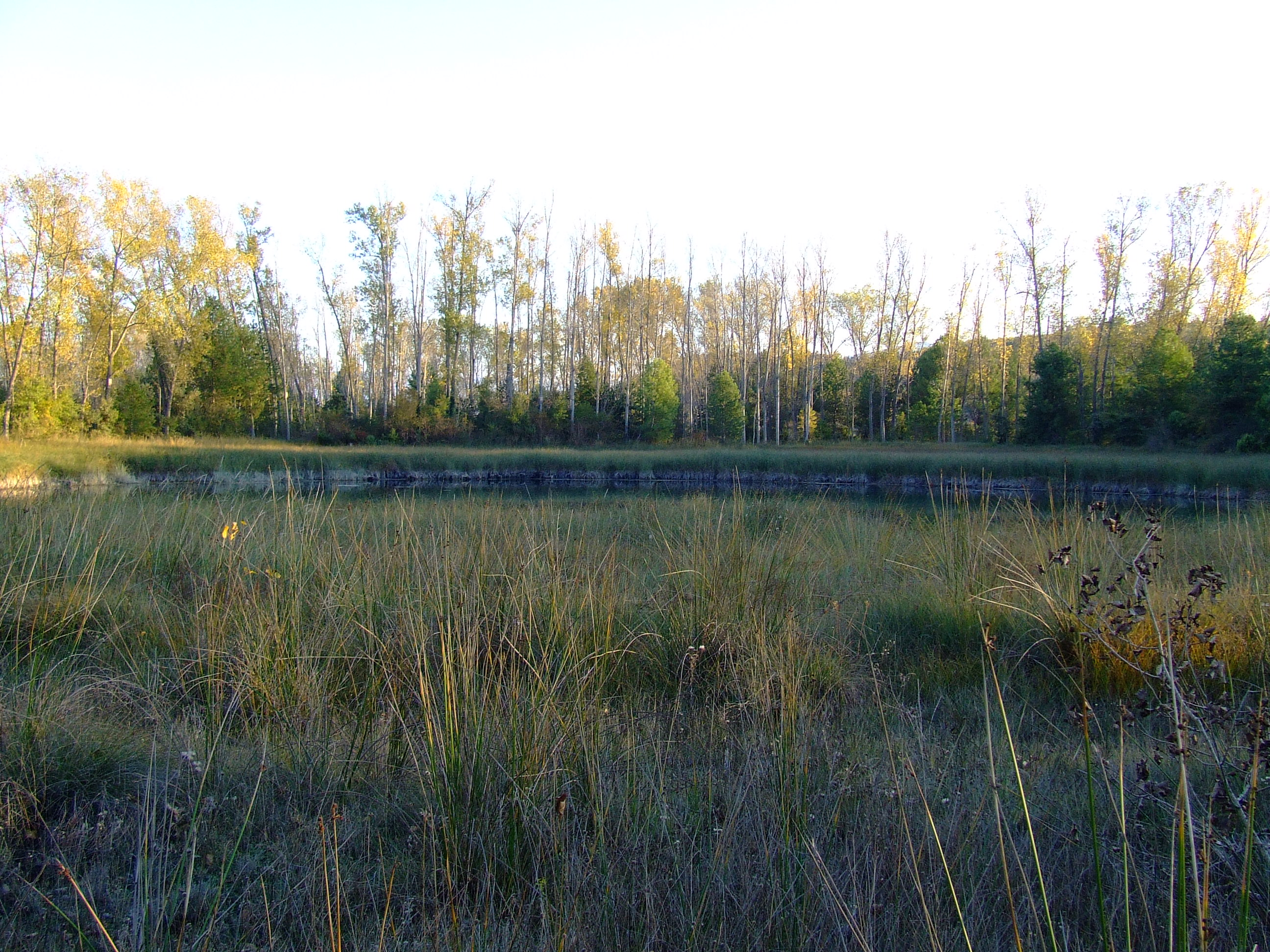 Estany Gros de Basturs (Orcau, Isona i Conca Dellà, Pallars Jussà)